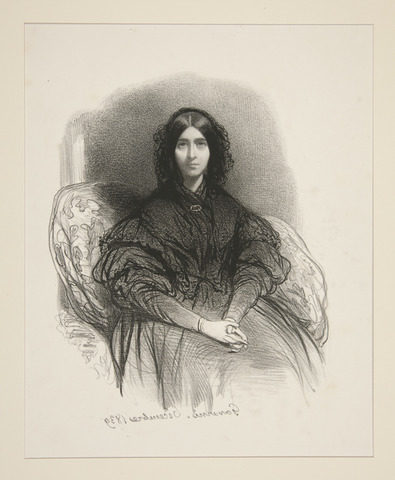 Retrato de Constance Junot d'Abrantès, esposa Aubert